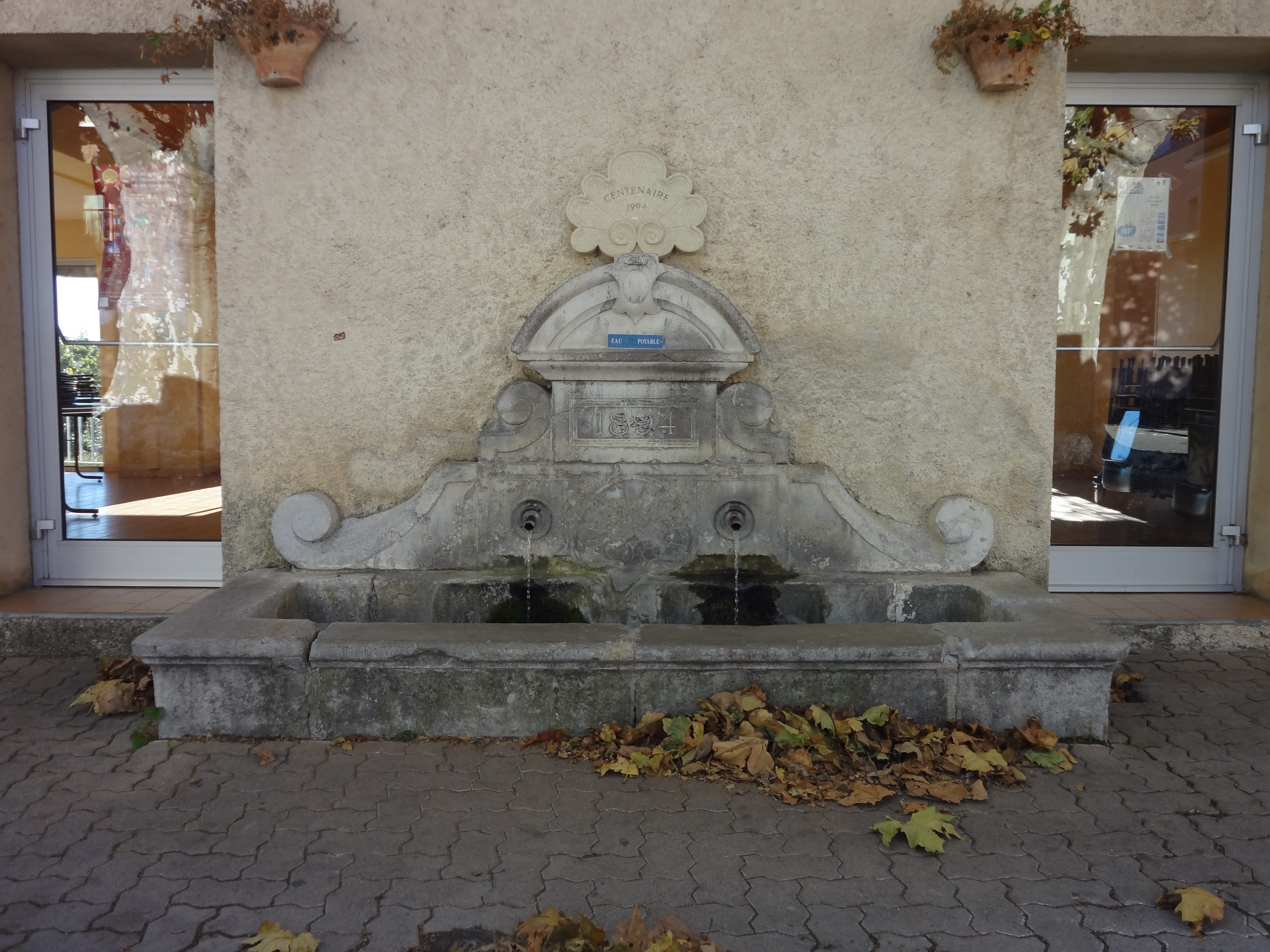 fontaine de La Brillanne avec chronogrammes 1894 et 1994